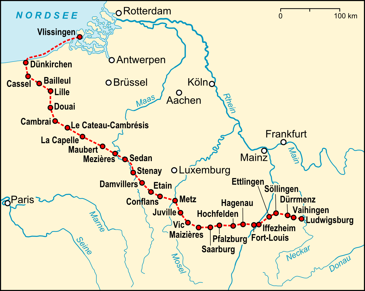 Marschroute des I. Bataillons des Kapregiments 1787